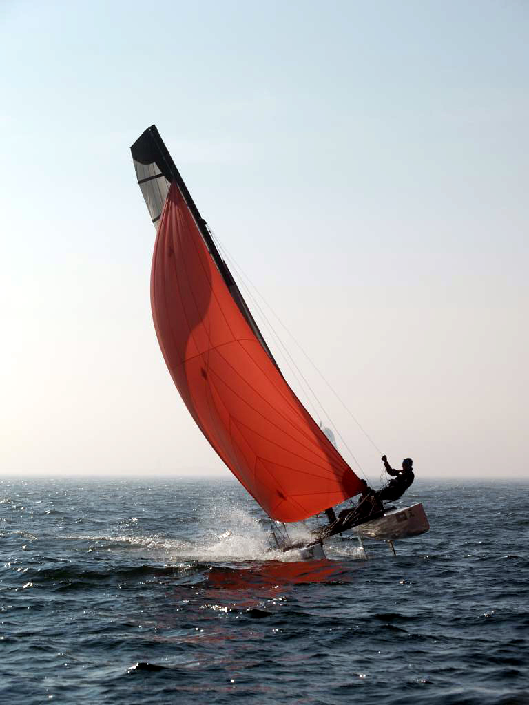 Hobie Cat Tiger, purjehduskilpailu, Suomen Urheiluveneliitto, Helsinki